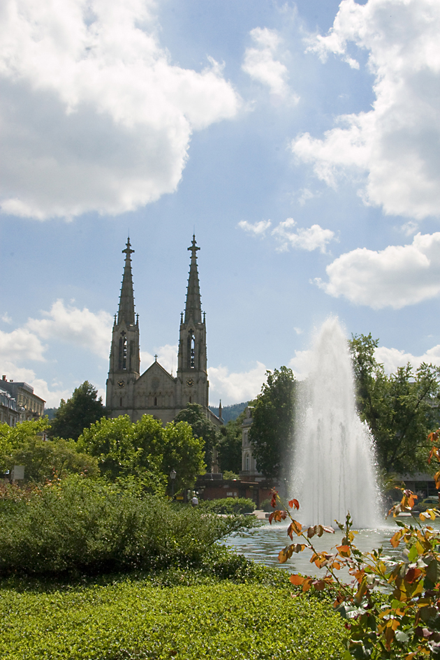 Der Augustaplatz in der südlichen Baden-Badener Innenstadt mit künstlichem See und Fontäne. Dahinter die Evangelische Stadtkirche.